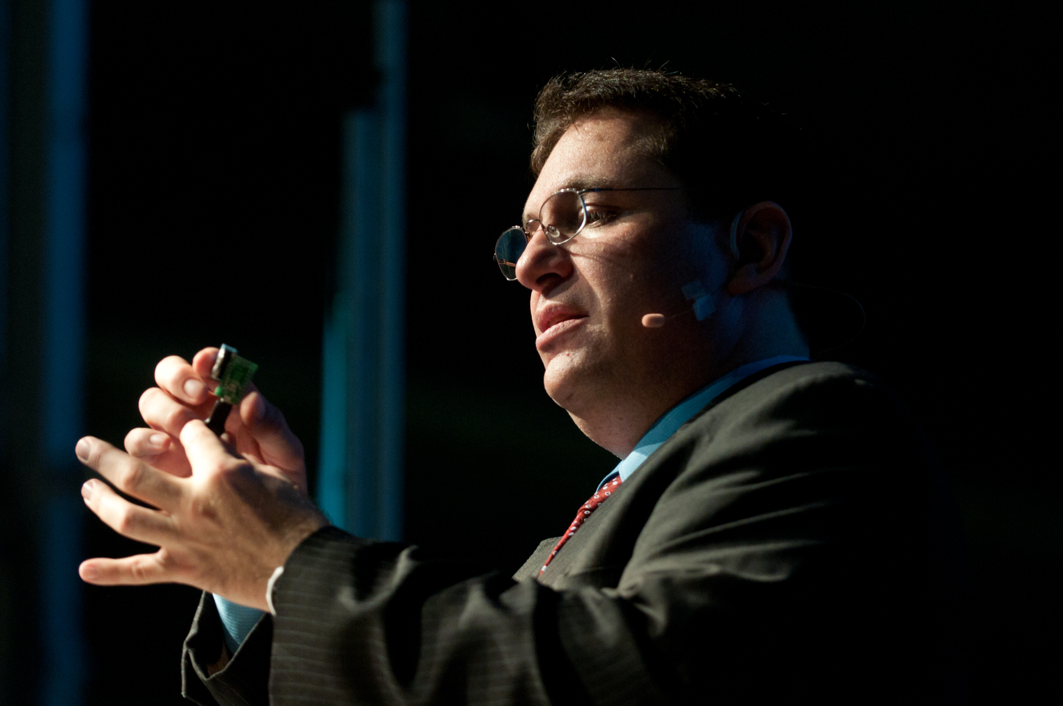 Estuvo en la Campus Party 2010. Habló sobre la Ingeniería Social y los riesgos para los usuarios. En la foto, muestra un "keylogger". Un dispositivo para grabar todo lo que teclea el usuario.